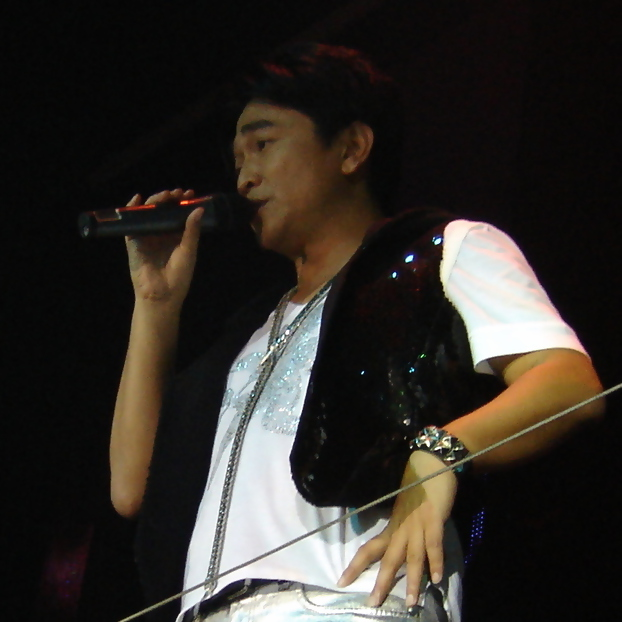 中文（中国大陆）: 吴宗宪在杭州